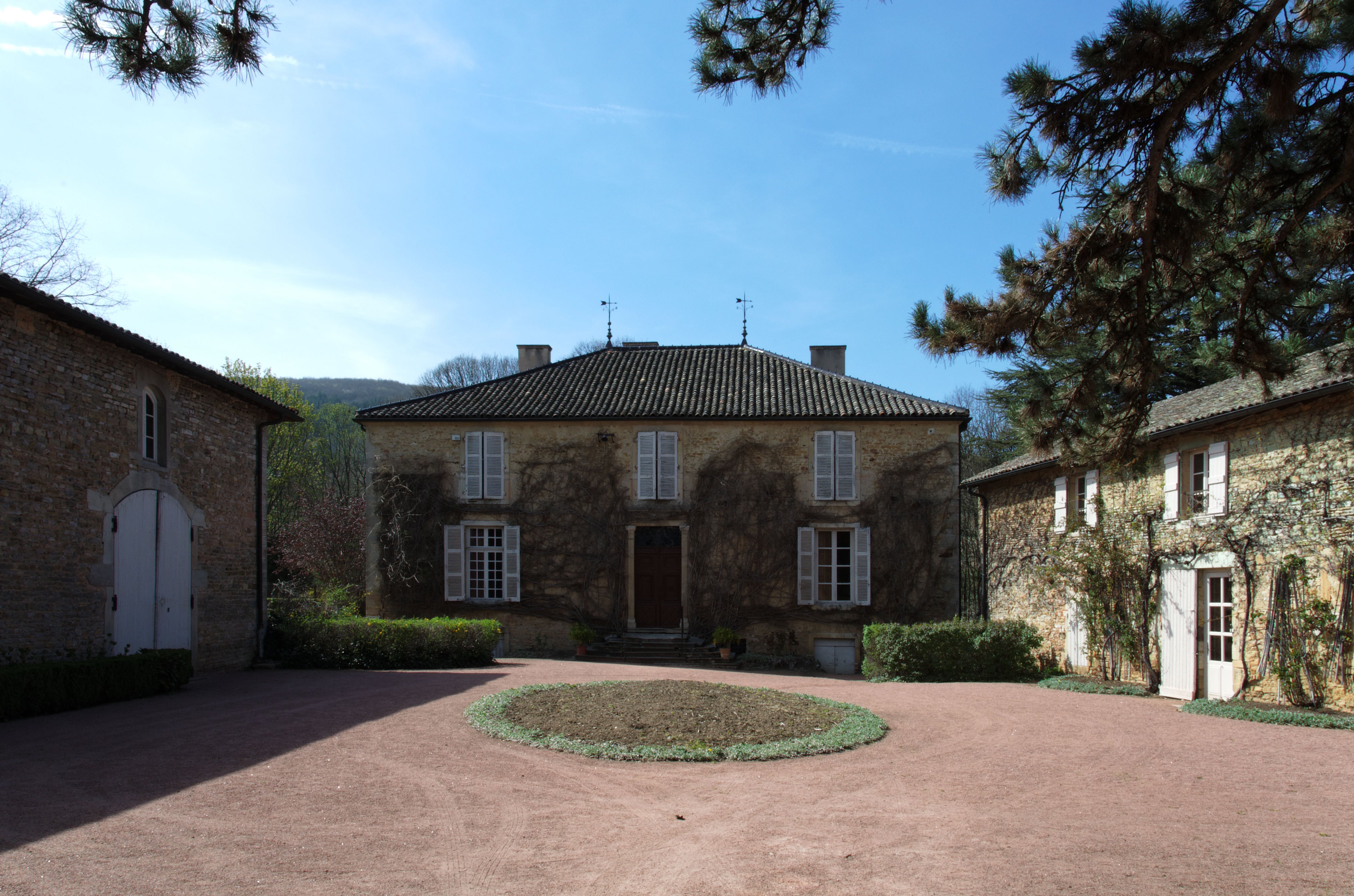 Maison de campagne d'Alphonse de Lamartine à Milly-Lamartine, Saône et Loire (71, France